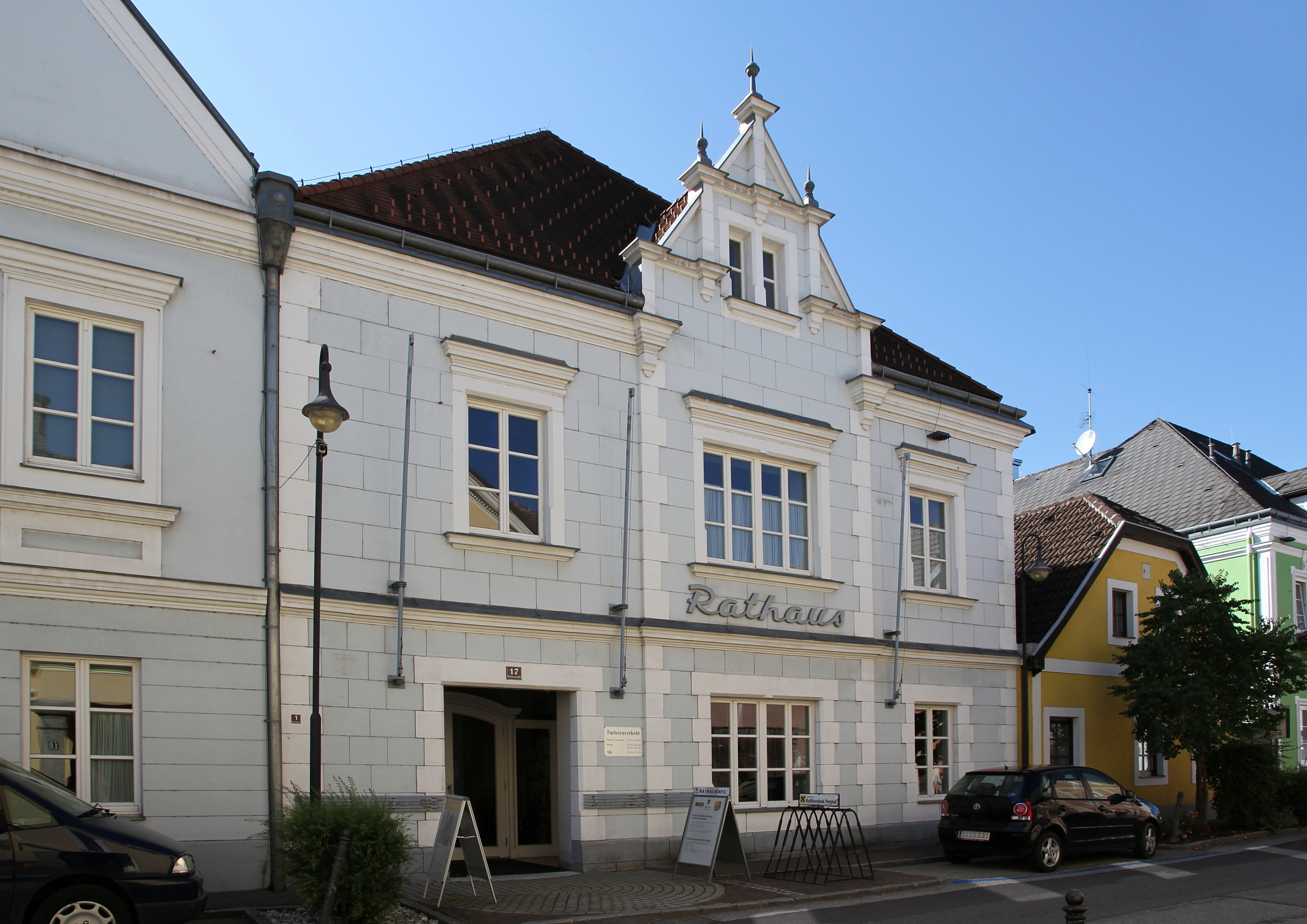 Rathaus der niederösterreichischen Marktgemeinde Purgstall. Ein Bau mit einer Kernsubstanz aus dem 16./17. Jahrhundert und einer späthistoristischer Fassade mit Giebelrisalit aus dem Jahr 1906.